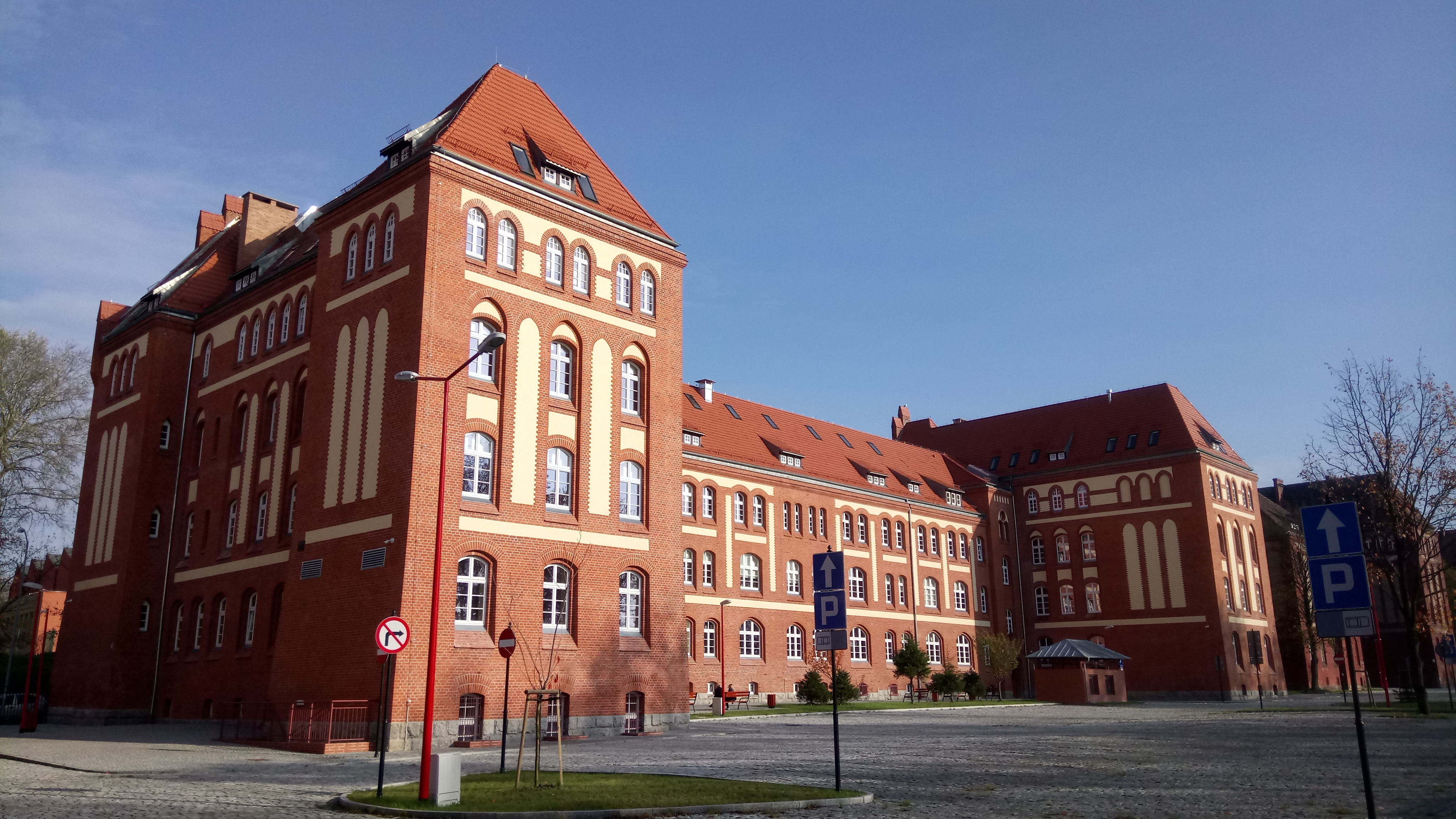 Wydział Filologiczny Uniwersytetu Szczecińskiego, 2017